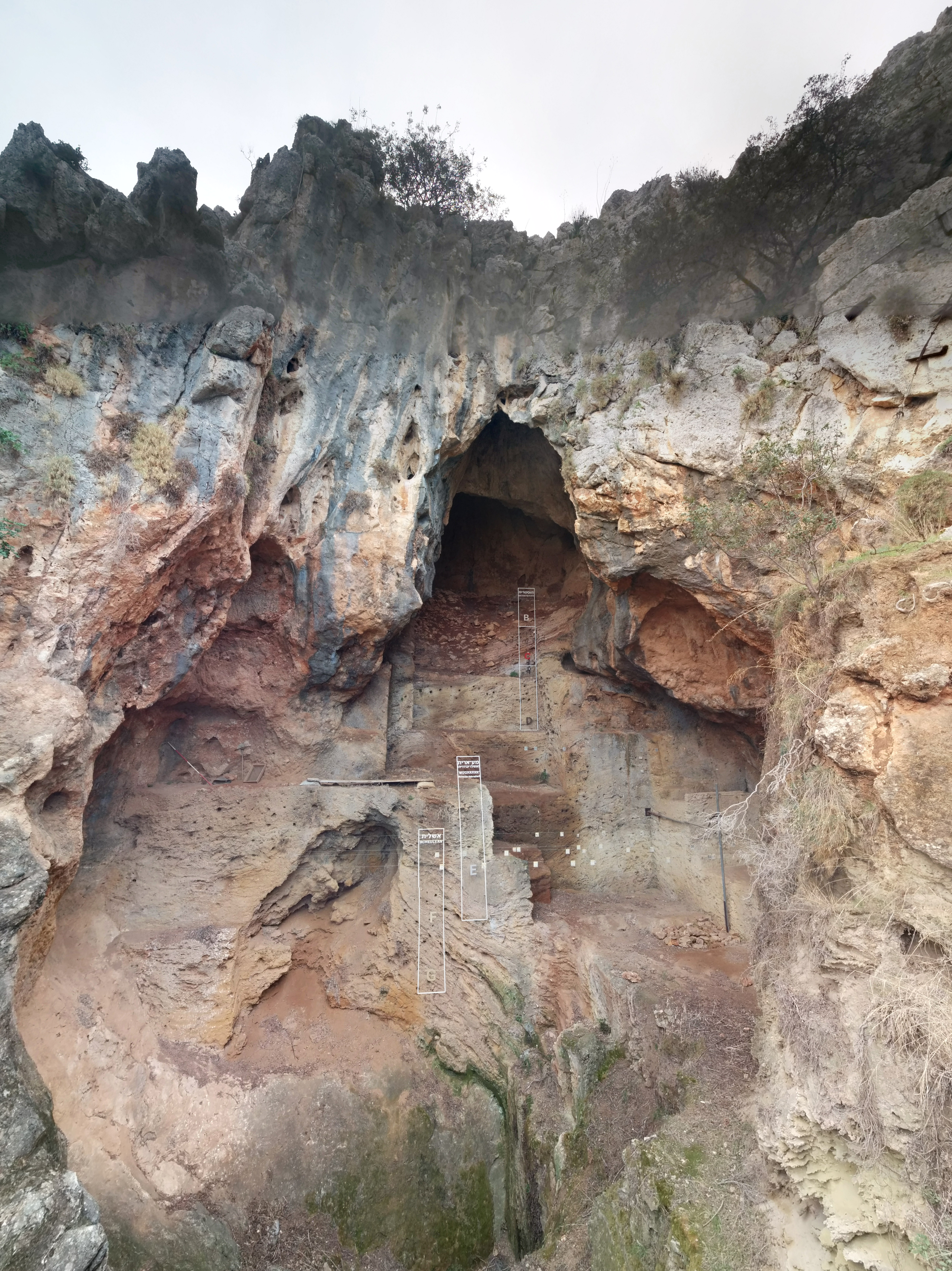 Nahal Me'arot Israel